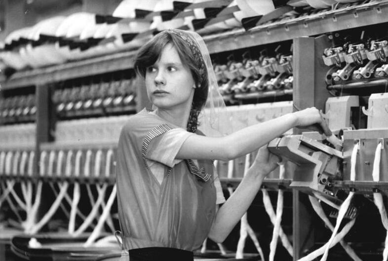 ADN-ZB-Thieme 9.10.1987 pra-Bez. Karl-Marx-Stadt: Wettbewerb. Ein Plus von 43 Tonnen bei hochveredeltem Garn steht bis jetzt in der Planbilanz der neuen Sekundärrohstoff-Spinnerei Werdau. Hier werden mit neuen Anlagen und weltstandsbestimmenden Technologien sogenannte Abgänge aus den Spinnereien und Abfälle der Konfektionsindustrie mit synthetischen Fasern zu hochwertigem Baumwollmischgarn veredelt. Daraus entstehen Arbeitskleidung, Jeans, Bettwäsche und modische Oberbekleidung. Qualitätsarbeiterin Anett Mingram arbeitet als OE-Spinnerein an der modernen Technik. -siehe auch 1987-1009-2N